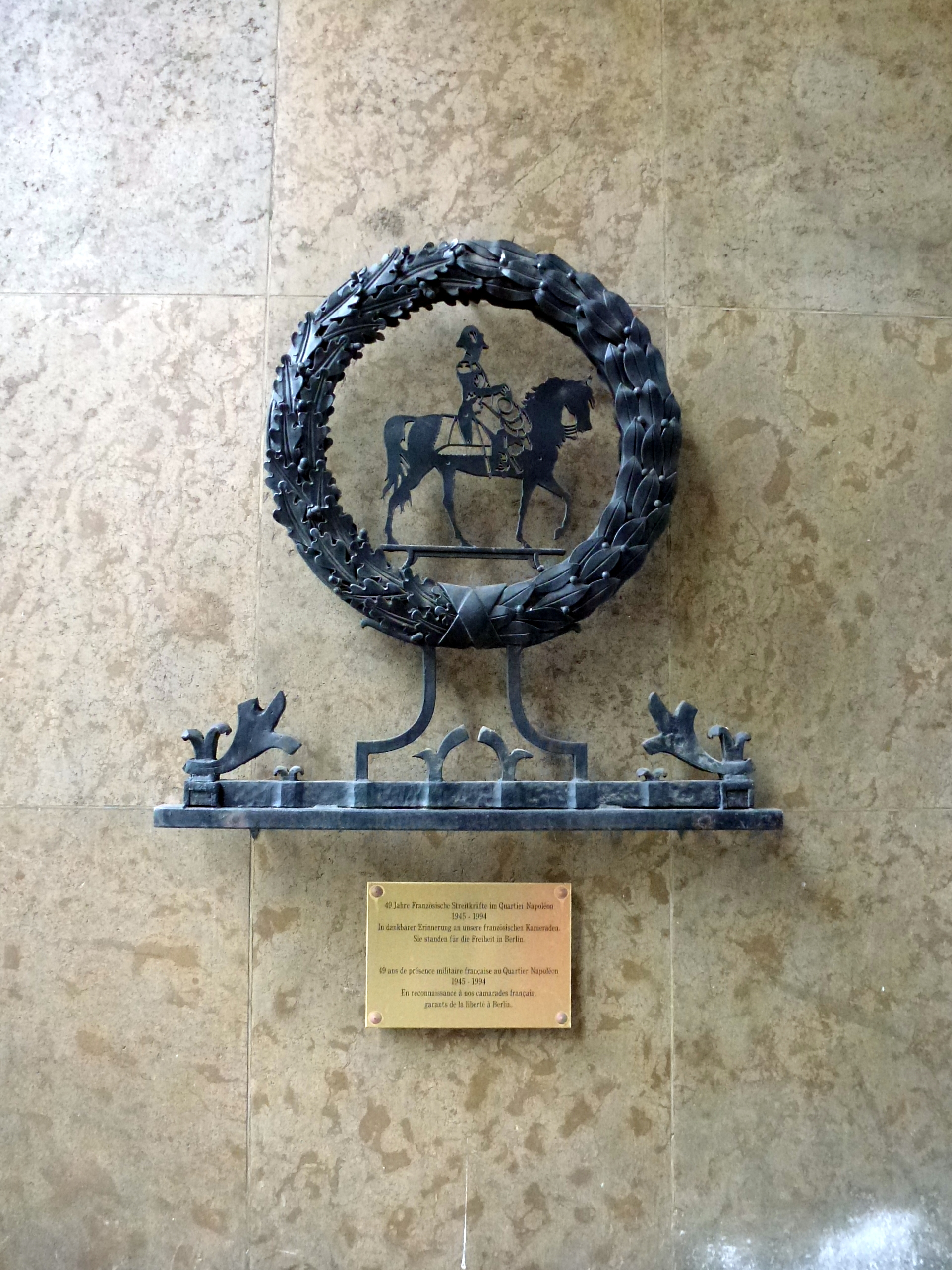 Julius-Leber-Kaserne Medaillon zur Erinnerung an die Französischen Streitkräfte. Inschrift: 49 Jahre Französische Streitkräfte im Quartier Napoléon 1945 - 1994 In dankbarer Erinnerung an unsere französischen Kameraden. Sie standen für die Freiheit in Berlin